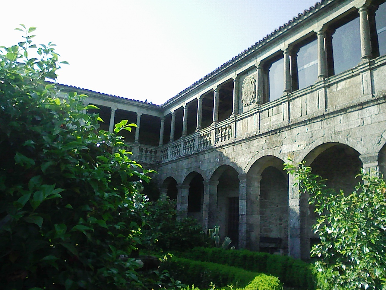 Pazo de Ximonde, situado en el ayuntamiento de Vedra (A Coruña), España.